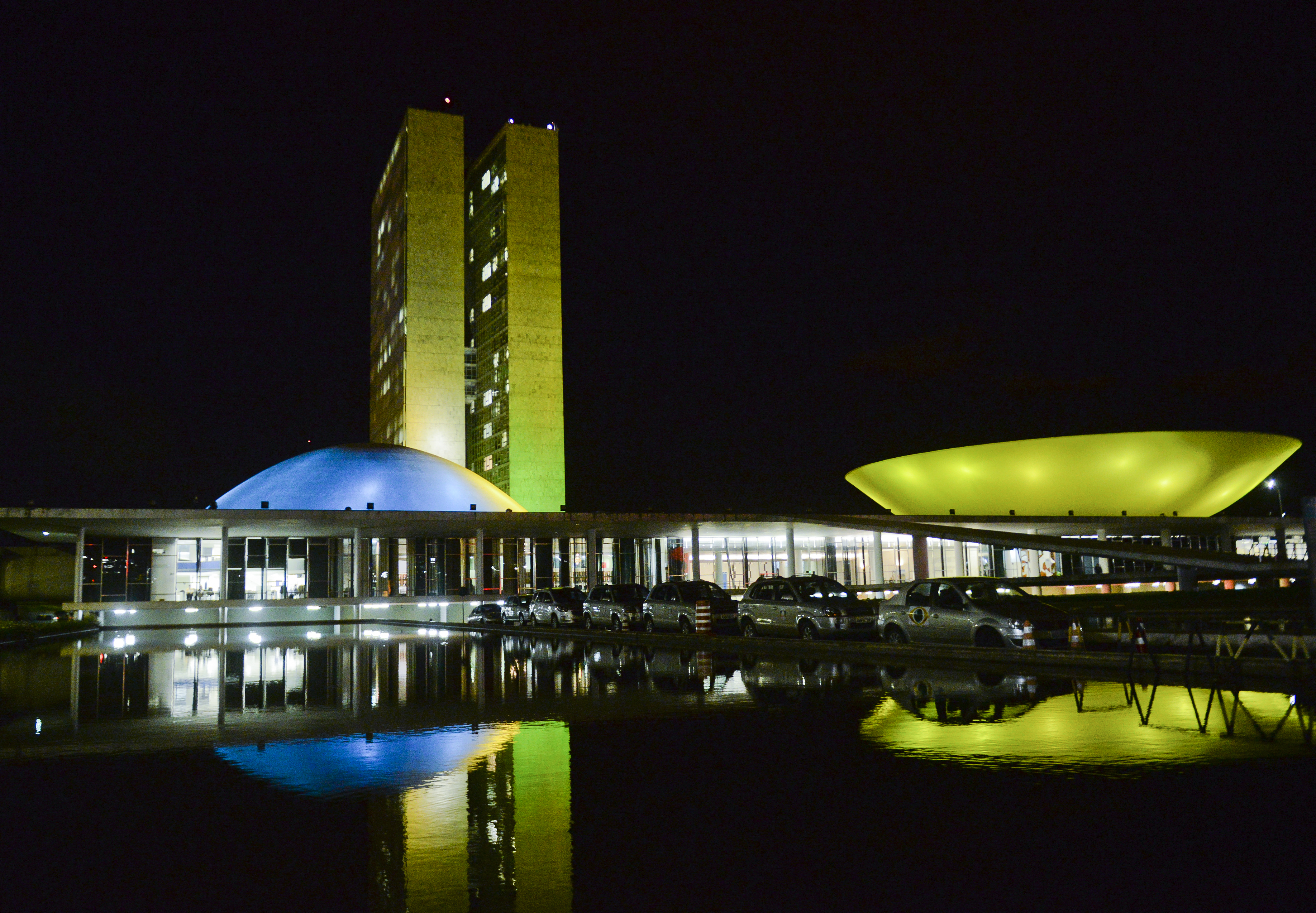 Congresso Nacional ganha iluminação verde e branca em referência ao acidente aéreo com a equipe do Chapecoense. Um das cúpulas segue com a cor azul para a campanha de combate ao câncer de próstata, Novembro Azul. Foto: Leonardo Sá/Agência Senado